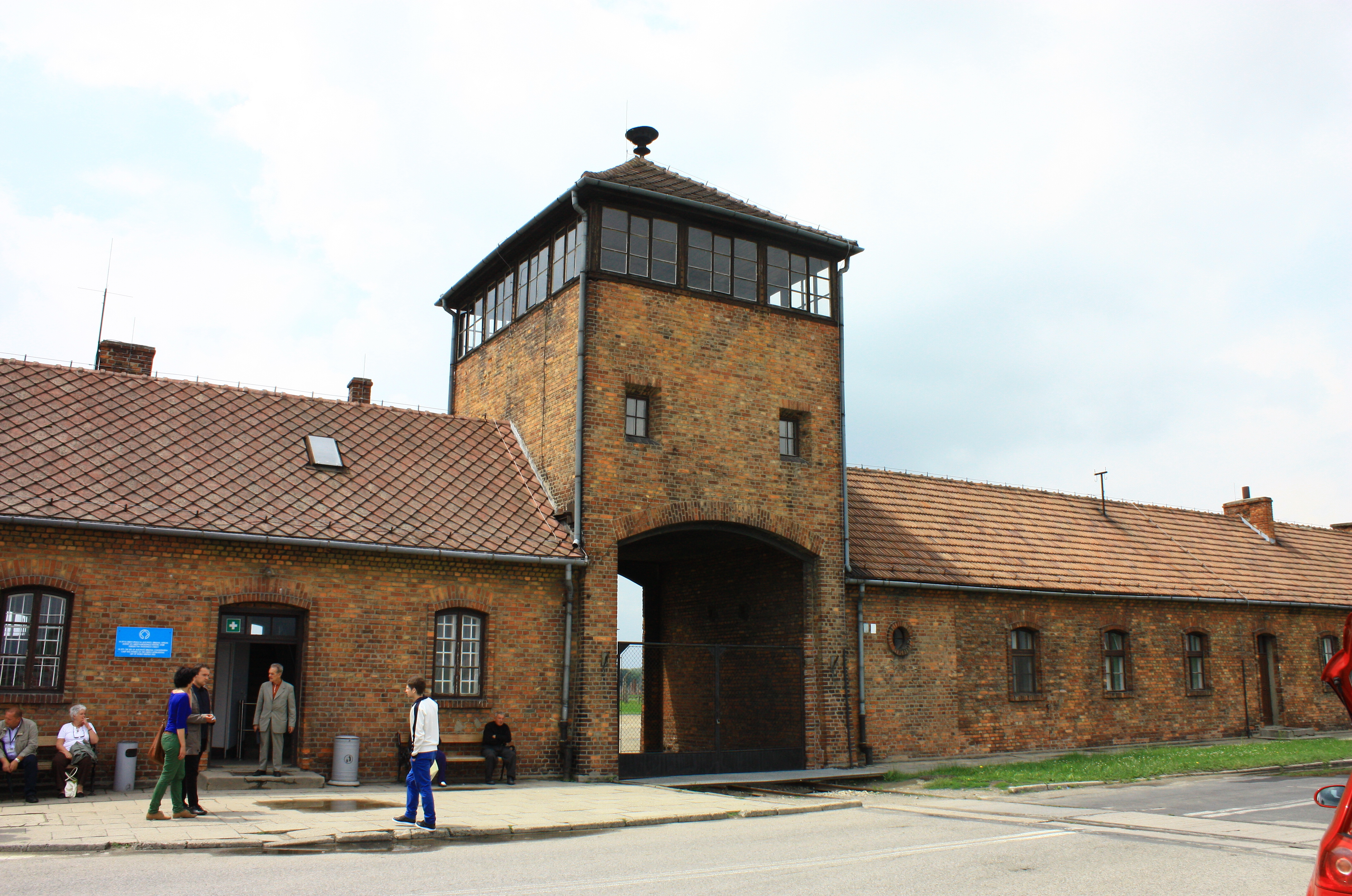 Oświęcim, zespół Byłego Nazistowskiego Niemieckiego Obozu Koncentracyjnego i Zagłady Ausc…, 1940-1945